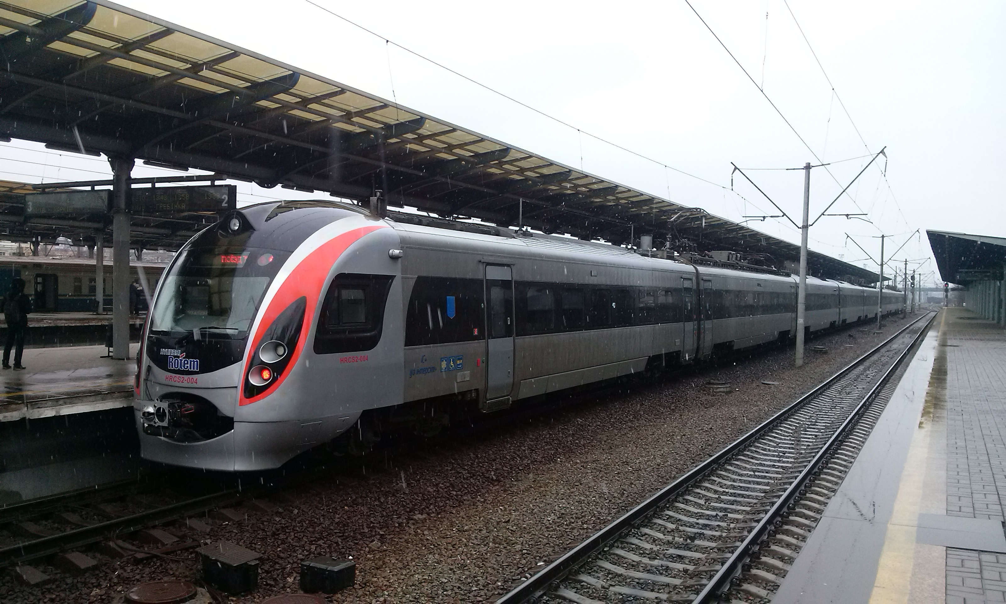 Железнодорожная станция "Дарница", 1 и 2 пути и поезд Huyndai